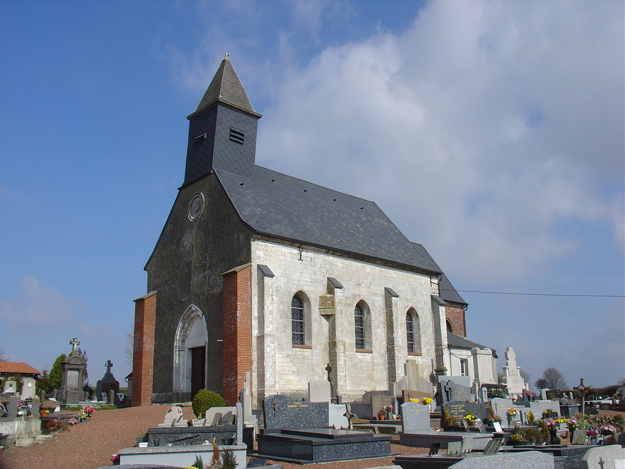 Église de Pressy